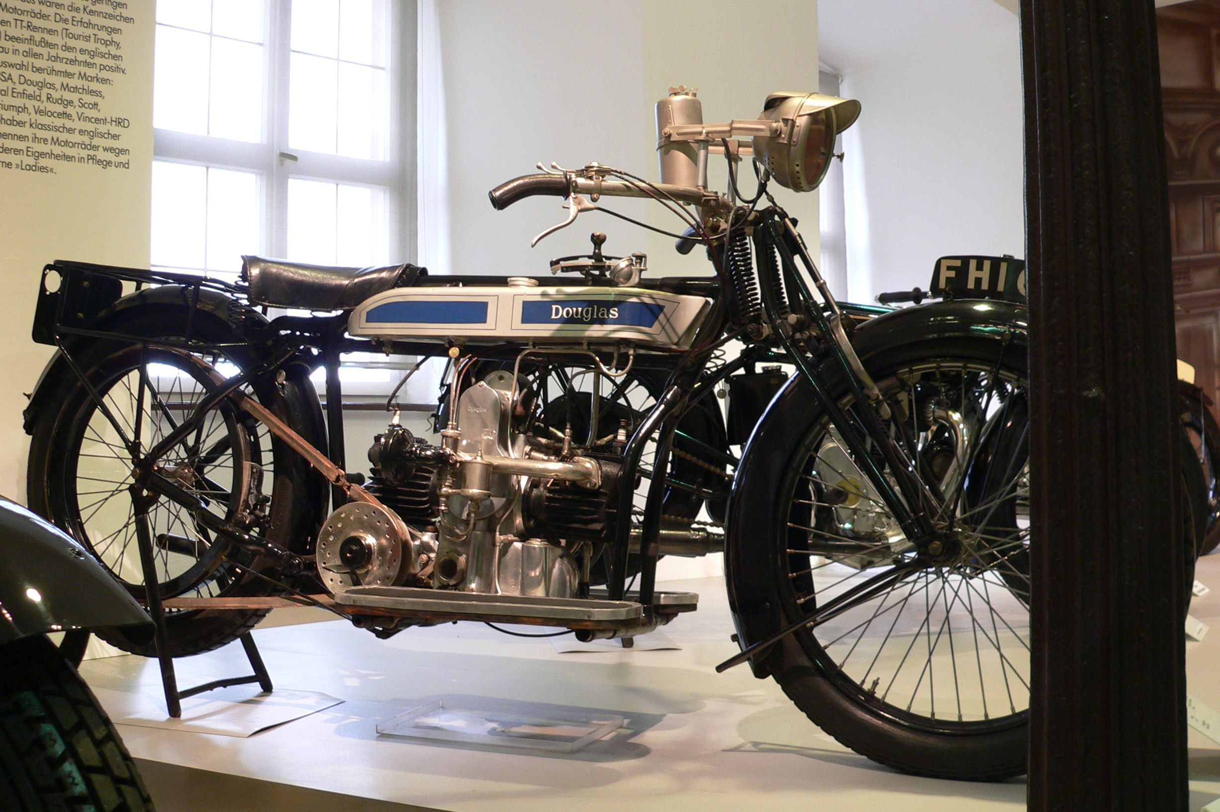 motocycle "Douglas" (1920) at the Deutsches Zweirad- und NSU-Museum (50 cm³, Zweizylinder-Boxermotor, 2,75 PS, Zweigang-Getriebe, Riemenantrieb)